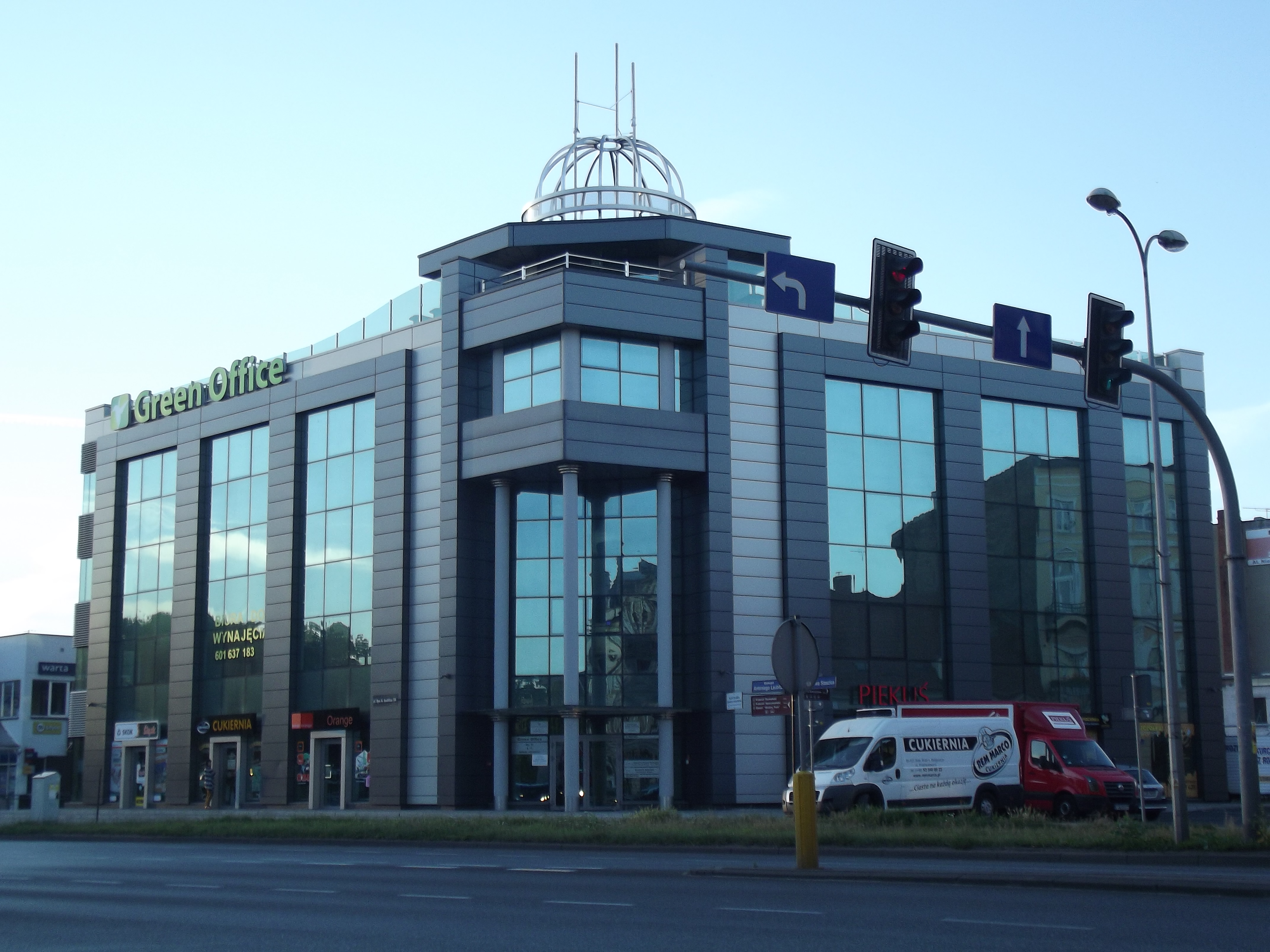 Biurowiec Green Office w Inowrocławiu, na skrzyżowaniu Laubitza i Dworcowej